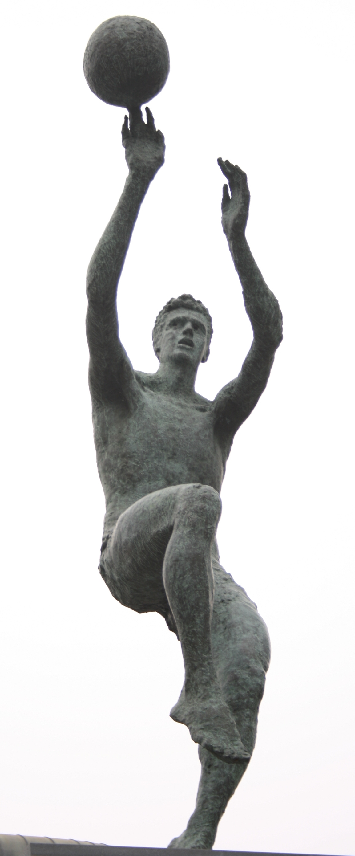 kip Dražena Petrovića ispred istoimene dvorane u Zagrebu